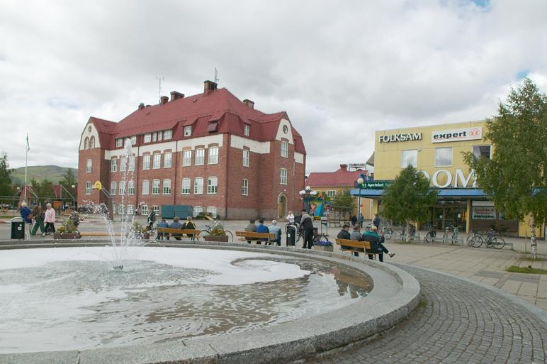 Hembygdsmuseet i gamla Centralskolan med Domus skymtande i bakgrunden. Motiv: Gällivare Kategori: Museum, Skola Hembygdsmuseet i gamla Centralskolan med Domus skymtande i bakgrunden.